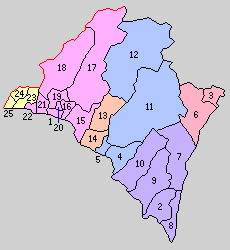 高知県安芸郡の町村制時点の町村。